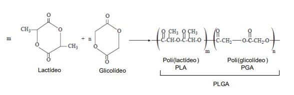 É a sintese do PLGA pela composição de PLA e PGA